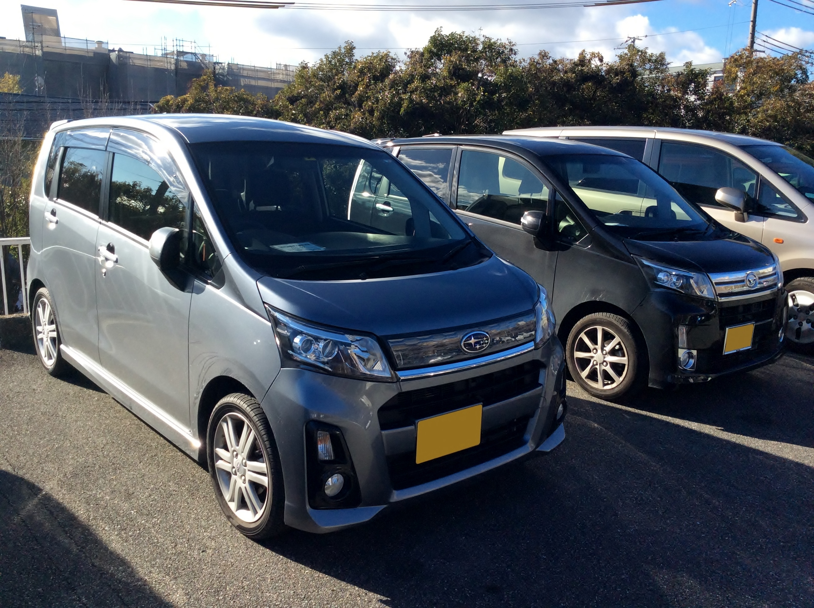 LA100後期型ダイハツ・ムーヴカスタムとスバル・ステラカスタムをフロントから撮影。